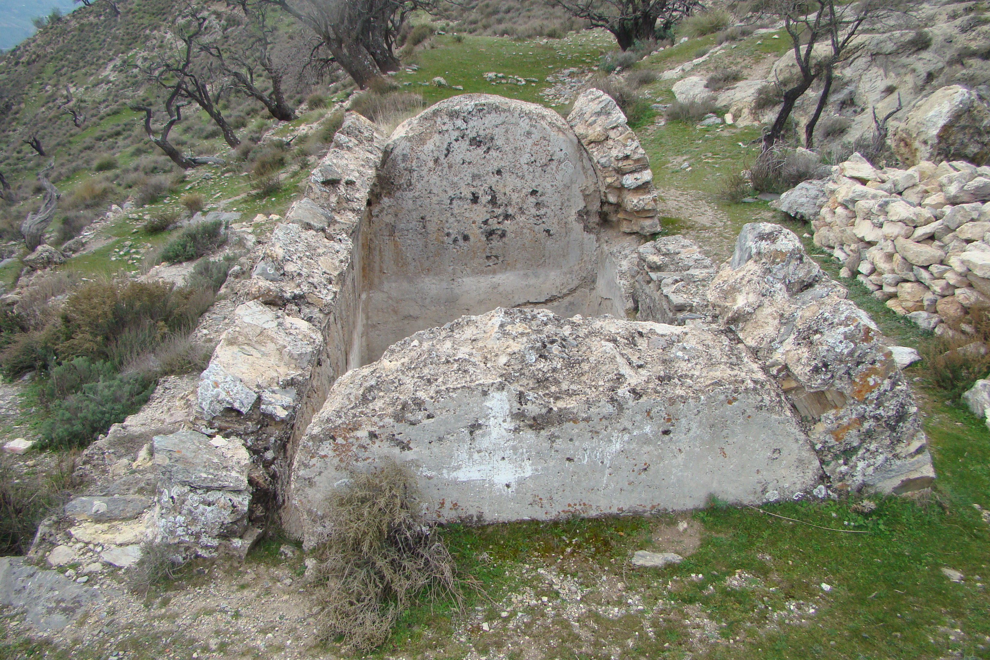 Uno de los aljibes del Fuerte de Juviles (Granada, España)